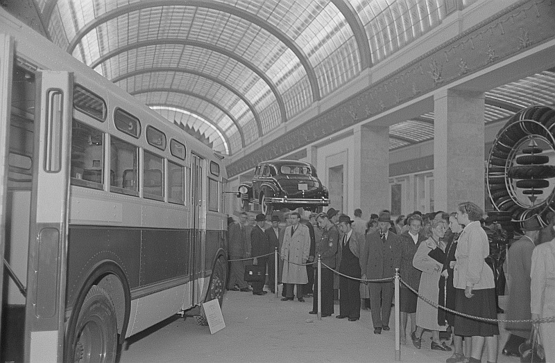 Original image description from the Deutsche FotothekBesucher an einem Messestand mit Kraftfahrzeugen in der sowjetischen Ausstellungshalle (Sowjetischer Pavillon)